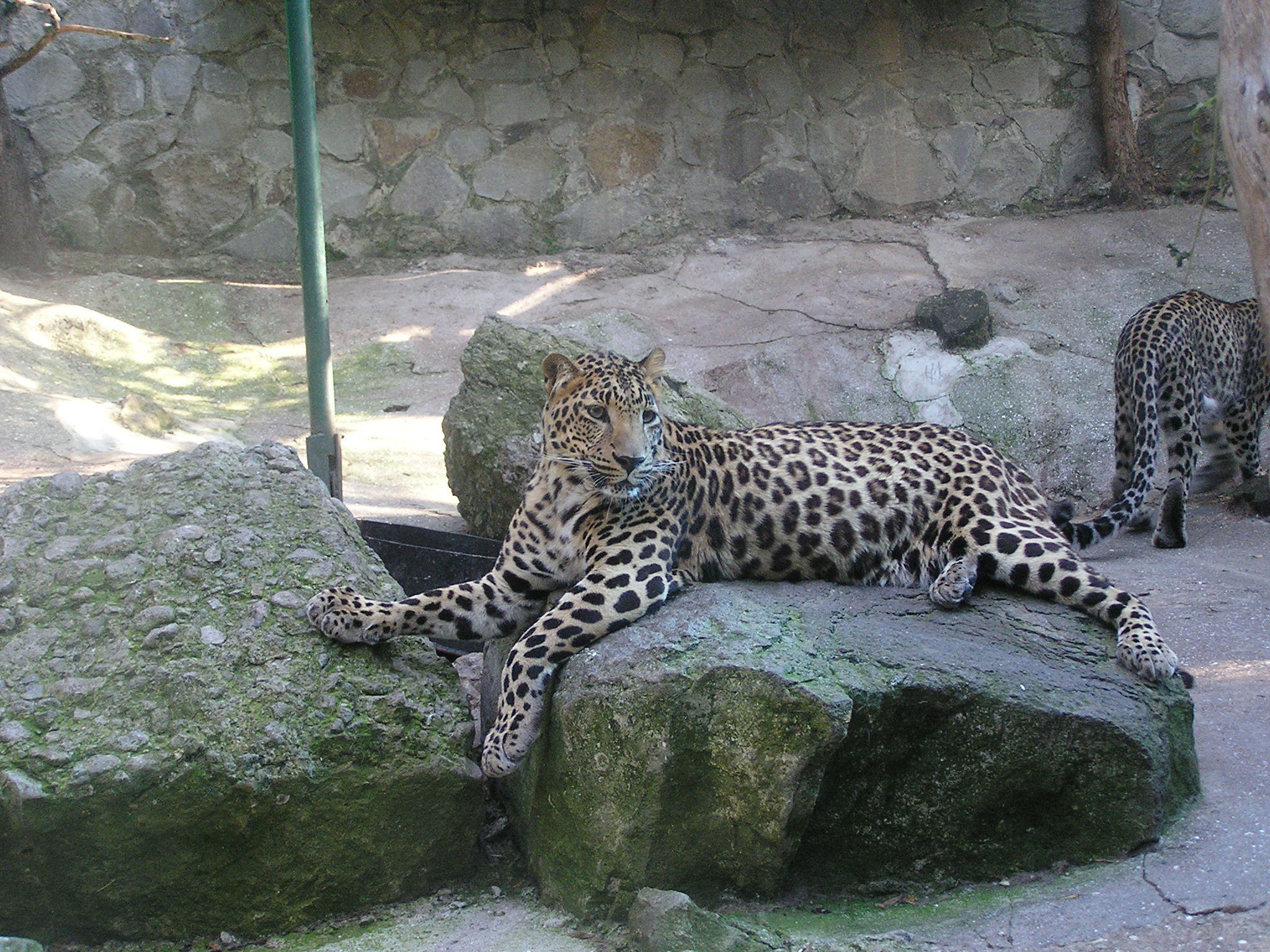 Ялтинский зоопарк.